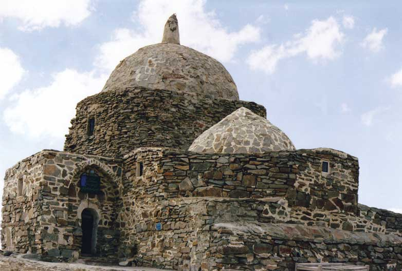 بقعه ایوب انصاری